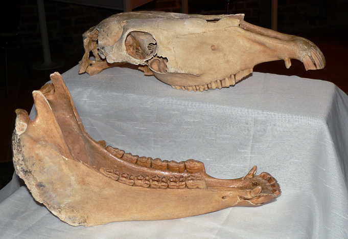 Pferdeschädel, gefunden bei der Ausgrabung der Siedlungskammer Rullstorf, Foto aufgenommen bei der Ausstellung "Pferd und Sachsen bei den Altsachsen" im Kloster Ebstorf.